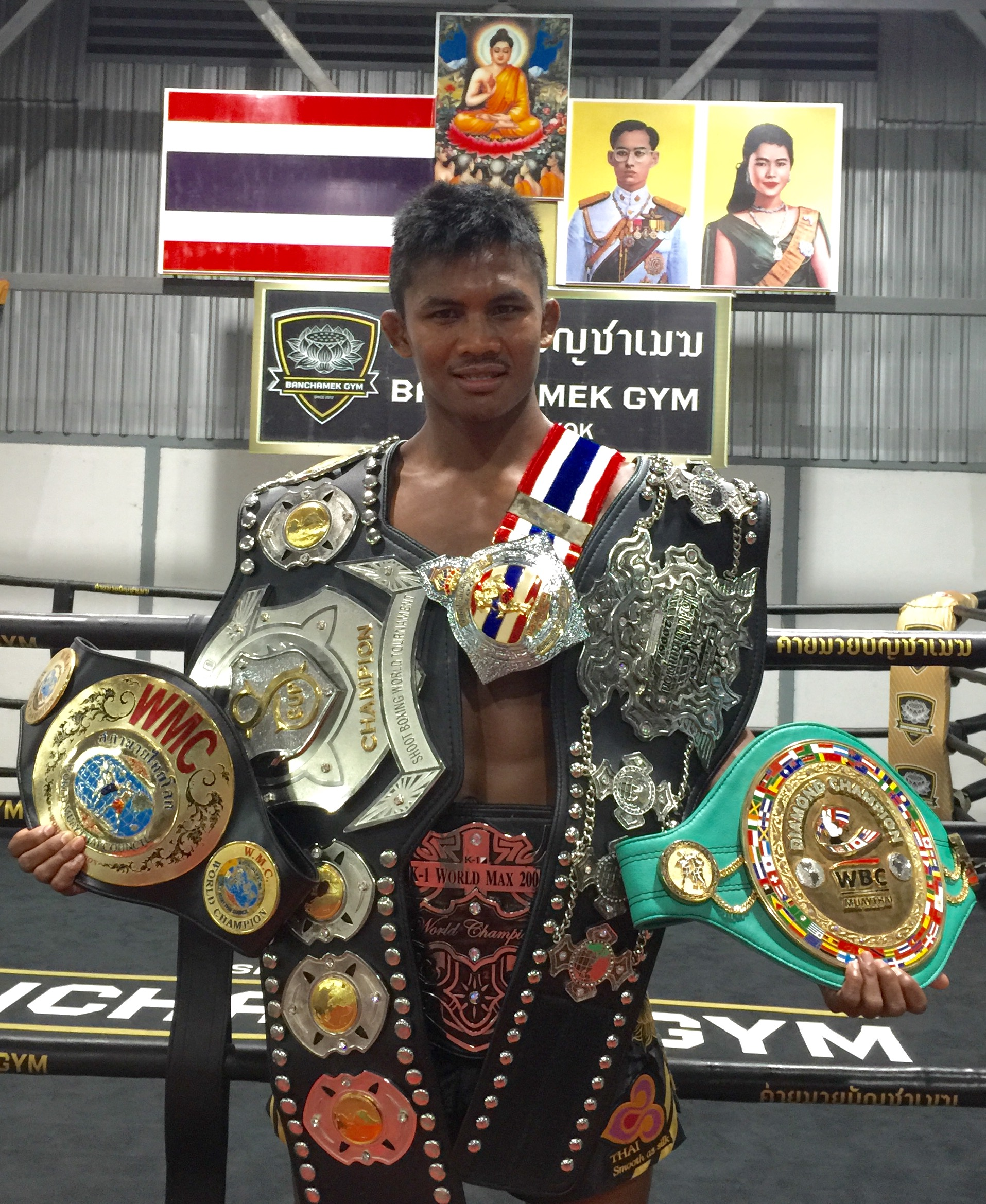 แชมป์บัวขาว